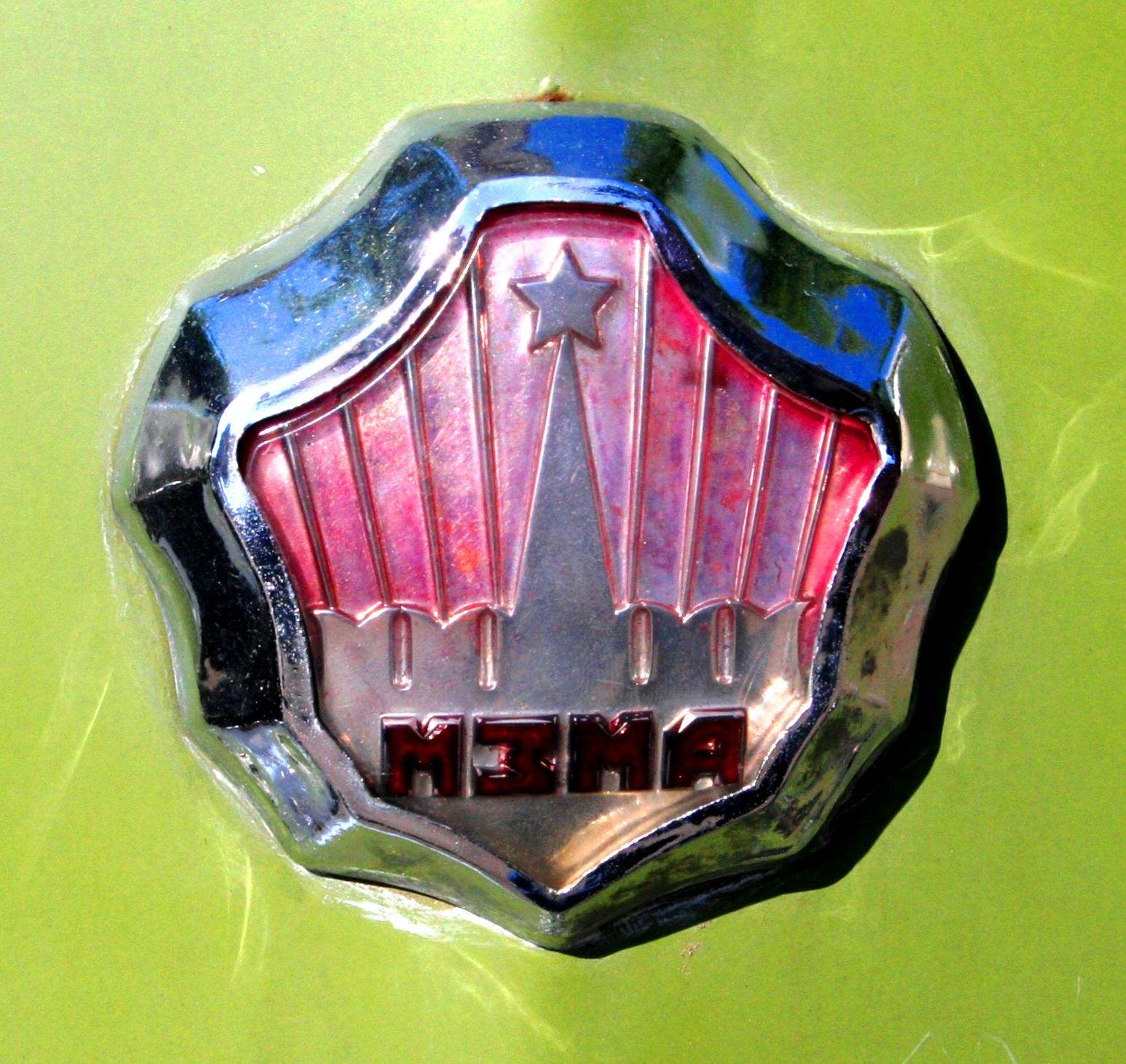 Эмблема завода МЗМА (1962 год)